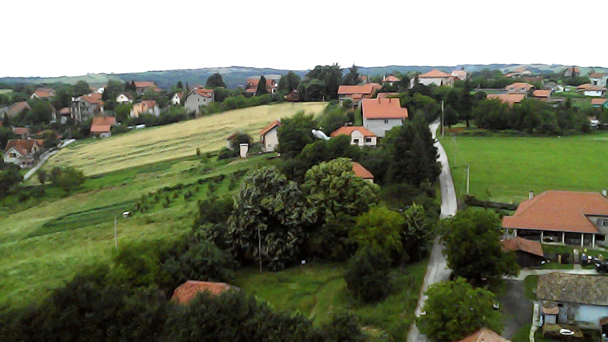 Аерофотографија једног дела Липовице